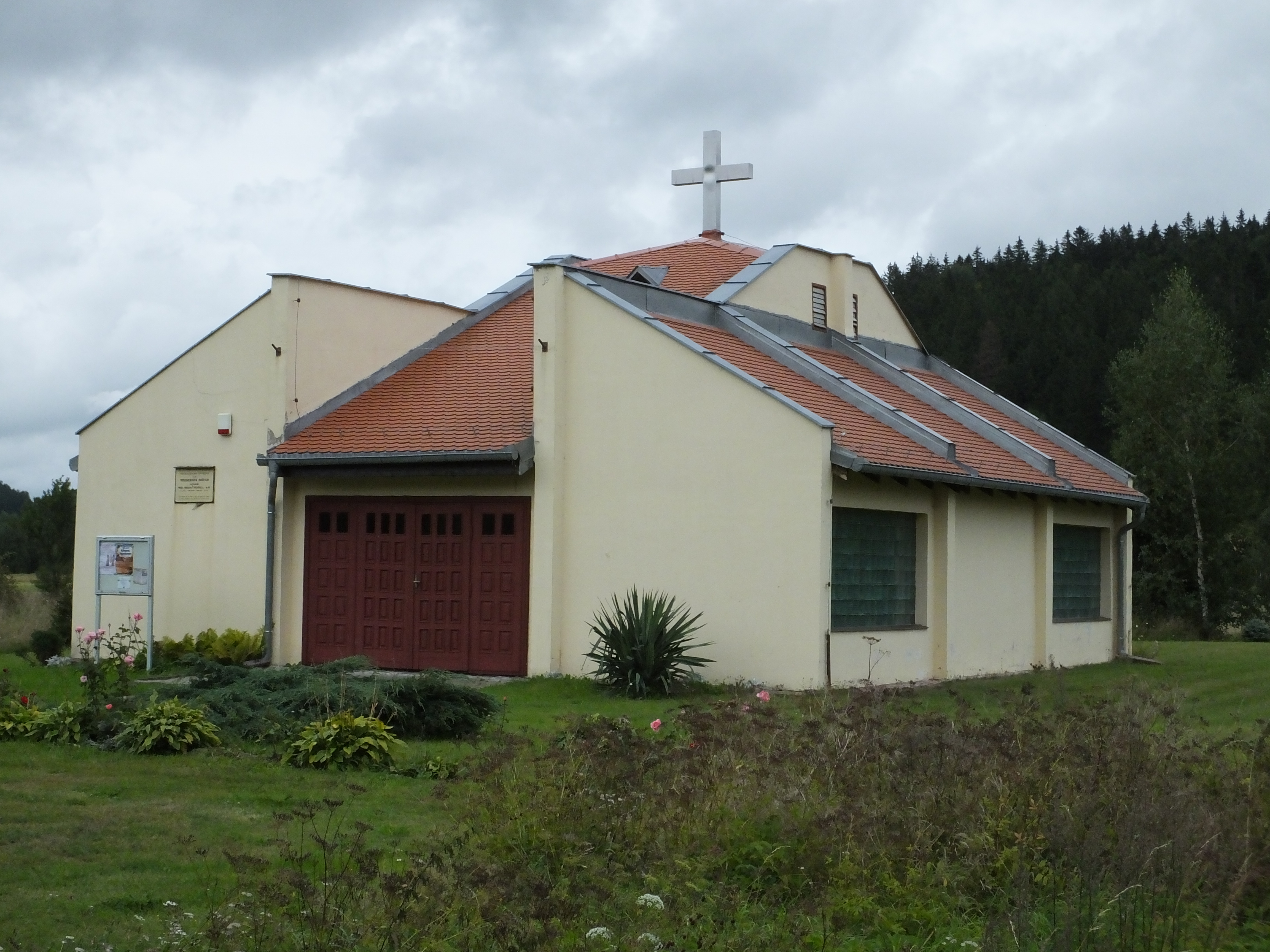 Kaplica w Janiszowie k/Kamiennej Góry